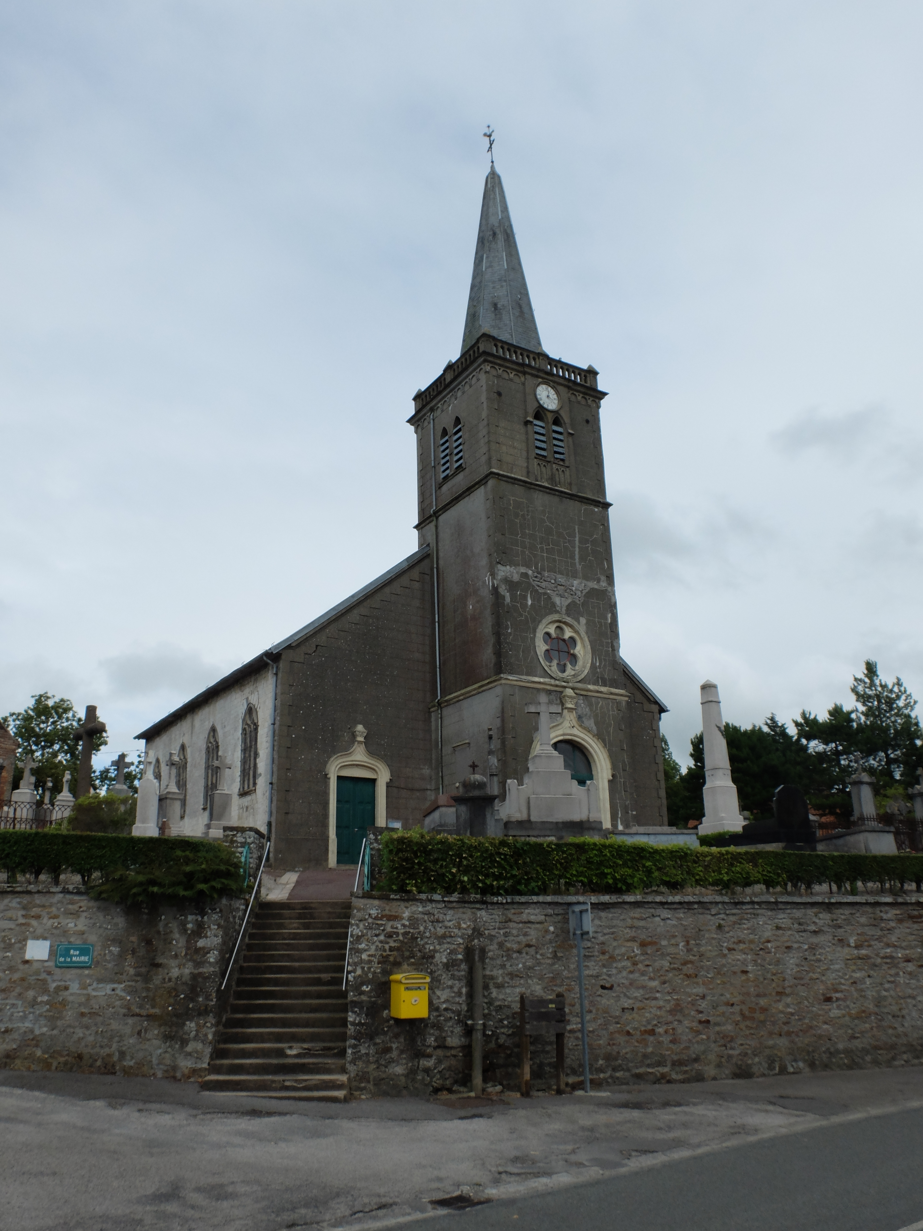 Vue de l'église Saint-Martin de Fiennes, édifice en craie blanche complété d'un clocher avec pignon en brique.